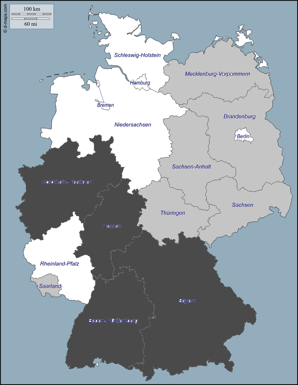 Germania 'ndrangheta grigio scuro presenza di locale grigio chiaro presenza di ndrine